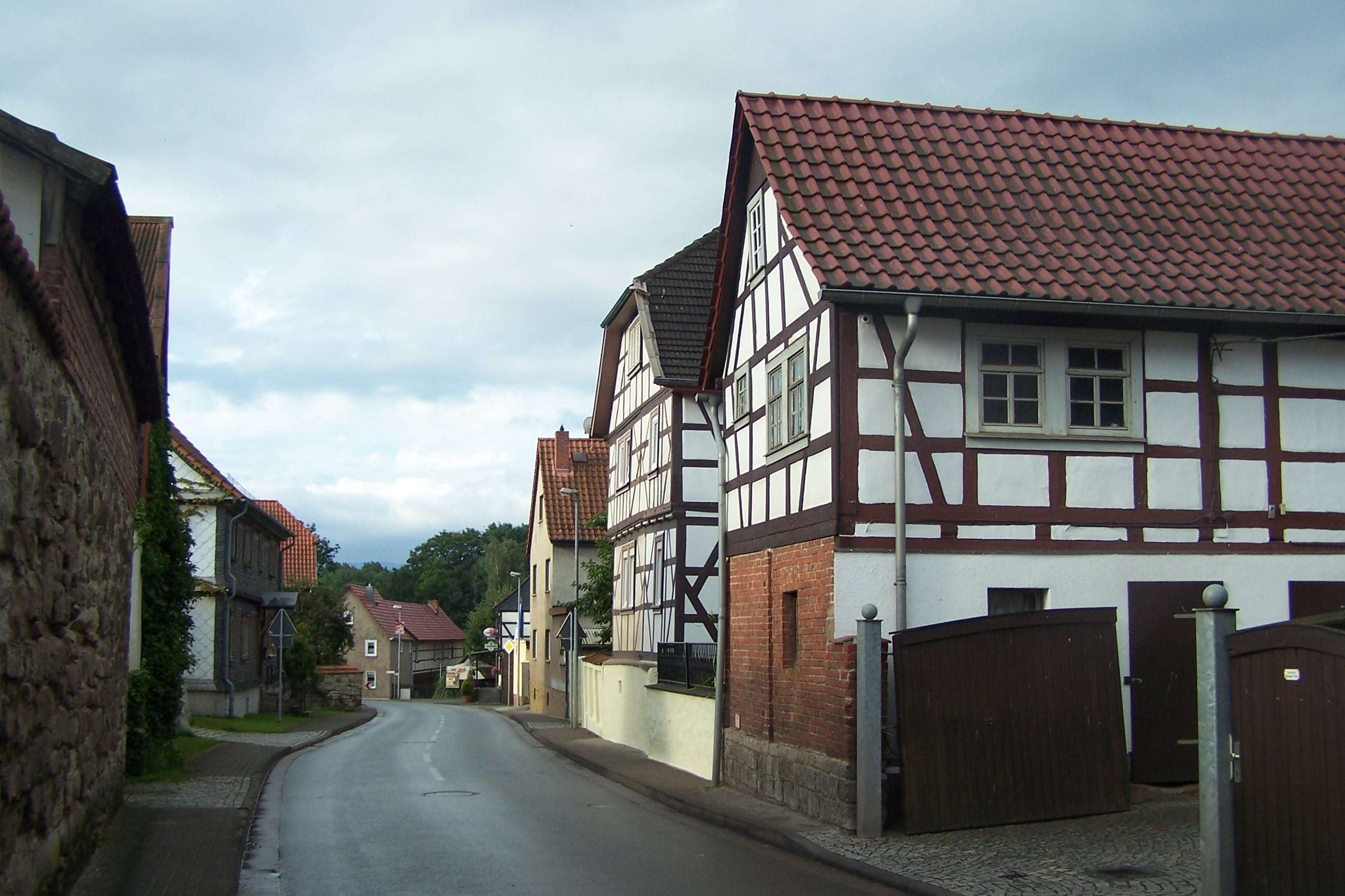 Mechterstädt